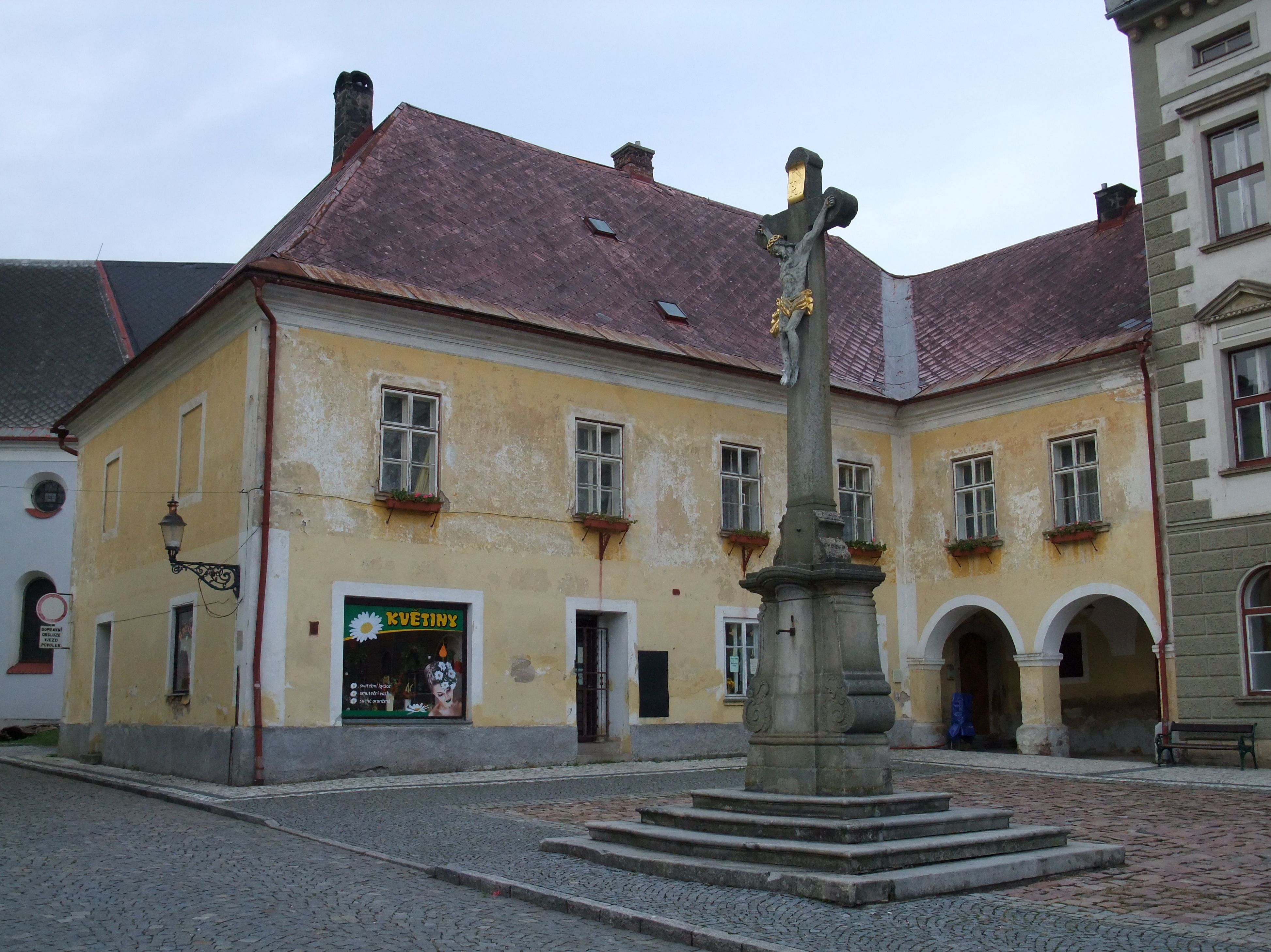 Fara, Velké náměstí 1, Králíky